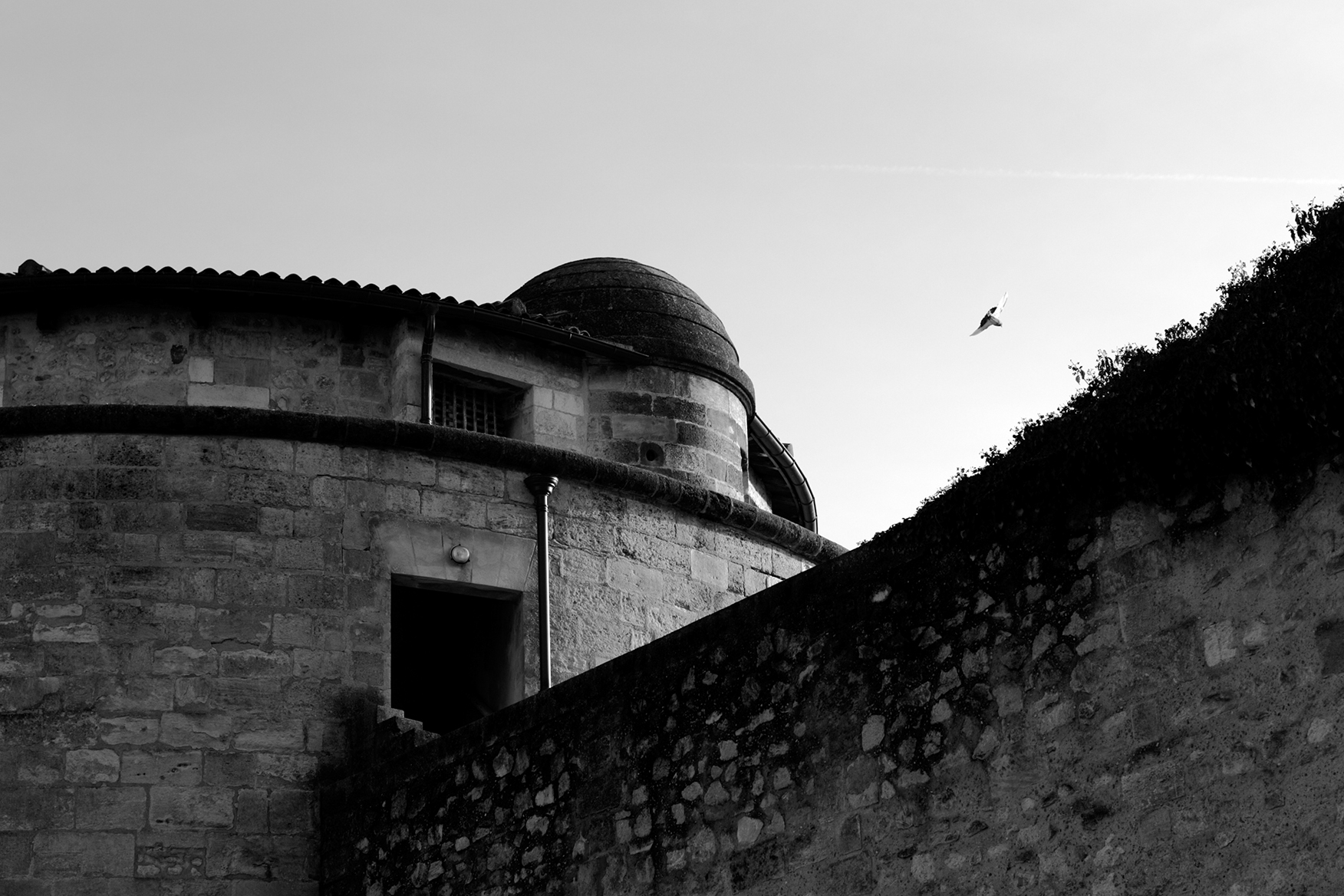 Château du Hâ, Bordeaux, France